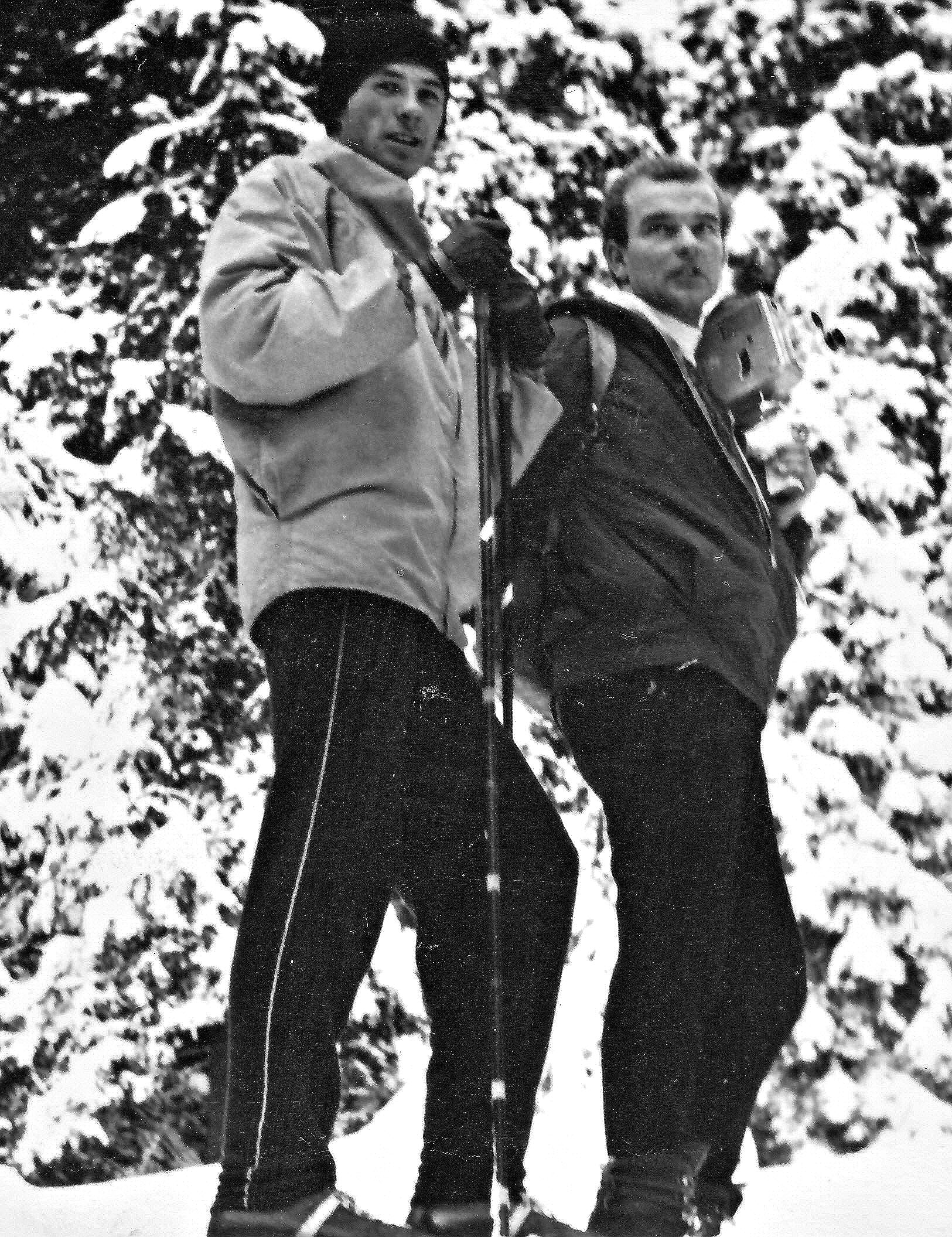 Slovenský horolezec a kameraman, účastník mnohých horolezeckých expedícii a výstupov v Alpách, na Kaukaze, Pamíre, v Himalájach, na Aljaške, v Južnej Amerike a najmä vo Vysokých Tatrách a EugenŠándory ( vľavo), pracovník Horskej služby TANAPu, ktorý zahynul po páde helikoptéry v roku 1969 vo Vysokých Tatrách